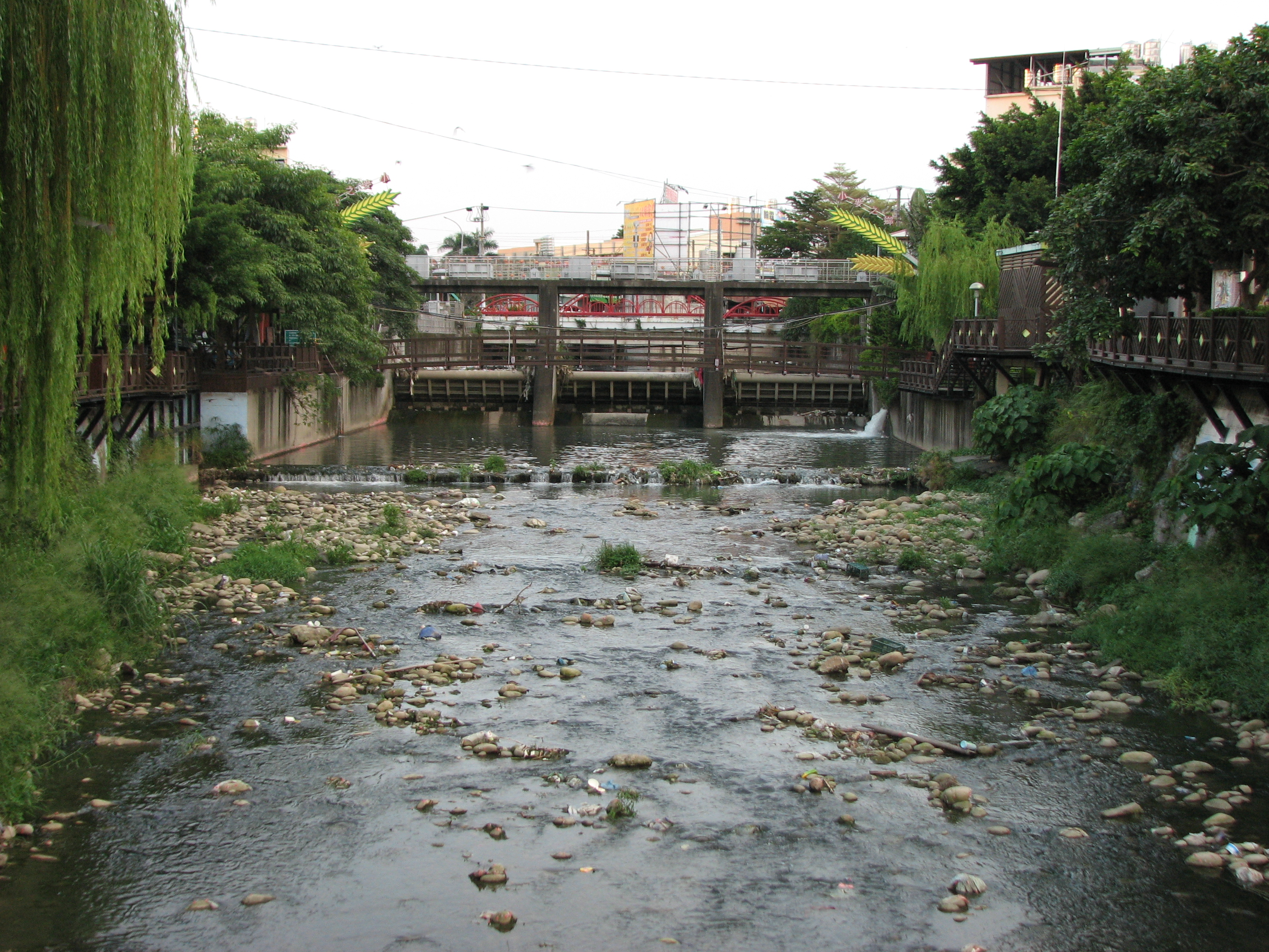 紅圳壩仔埤，於1998年（民國87年）由台中水利會耗資新台幣五千萬元興建，下游是灌溉大雅秀山地區約300公頃的紅圳和筏子溪的源頭，兼具灌溉和排水的功能，為灌排順利因此採用自動控制傾倒式水門設計，當水位高於水門15或30公分以上時，水經導流管流至承接桶，承接桶的重量連通自動開啟裝置，把水門打開排水。